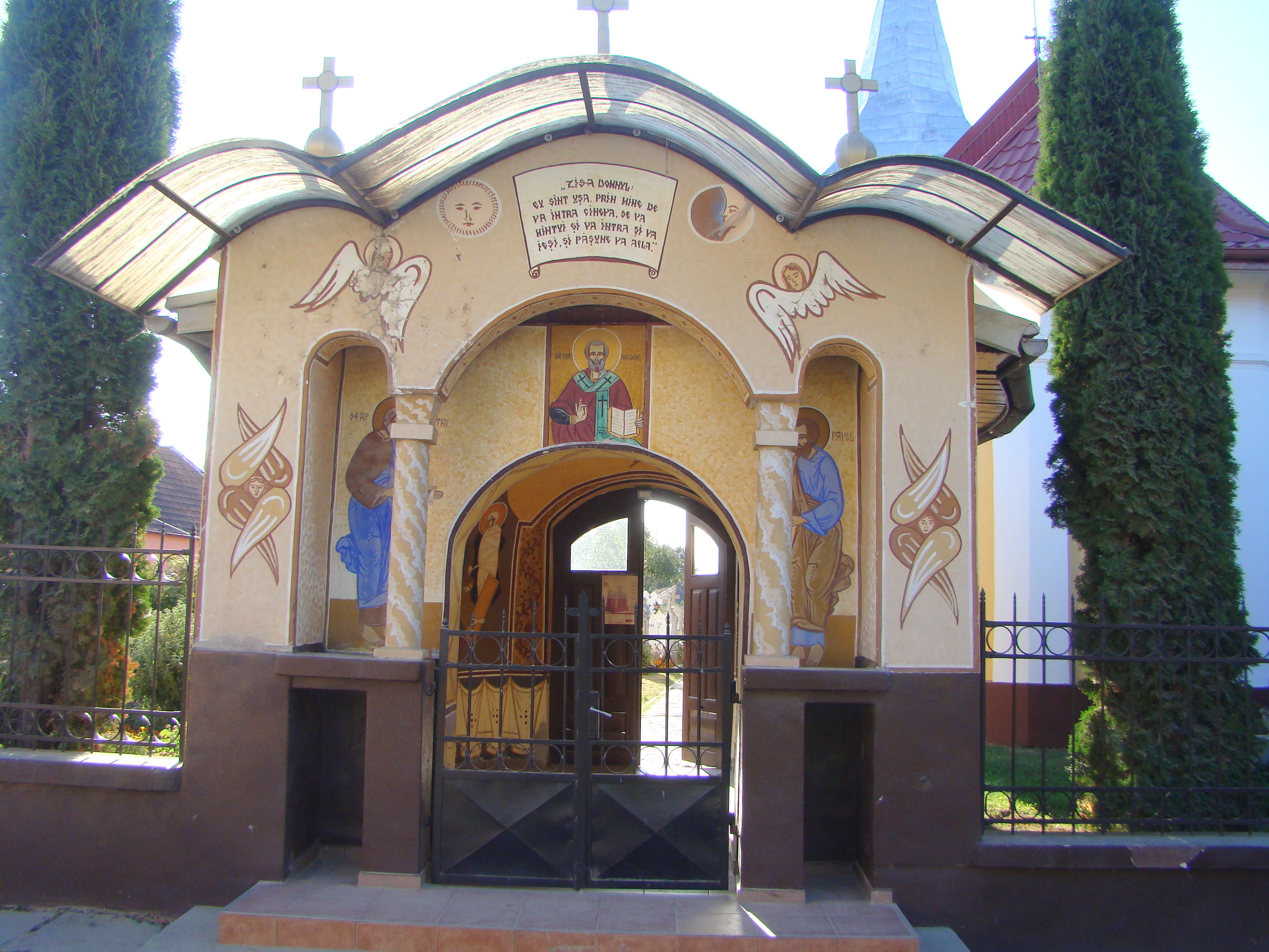 Ansamblul bisericii „Sf. Nicolae”, sat Voivodeni; comuna Voila 221 sec. XVIII